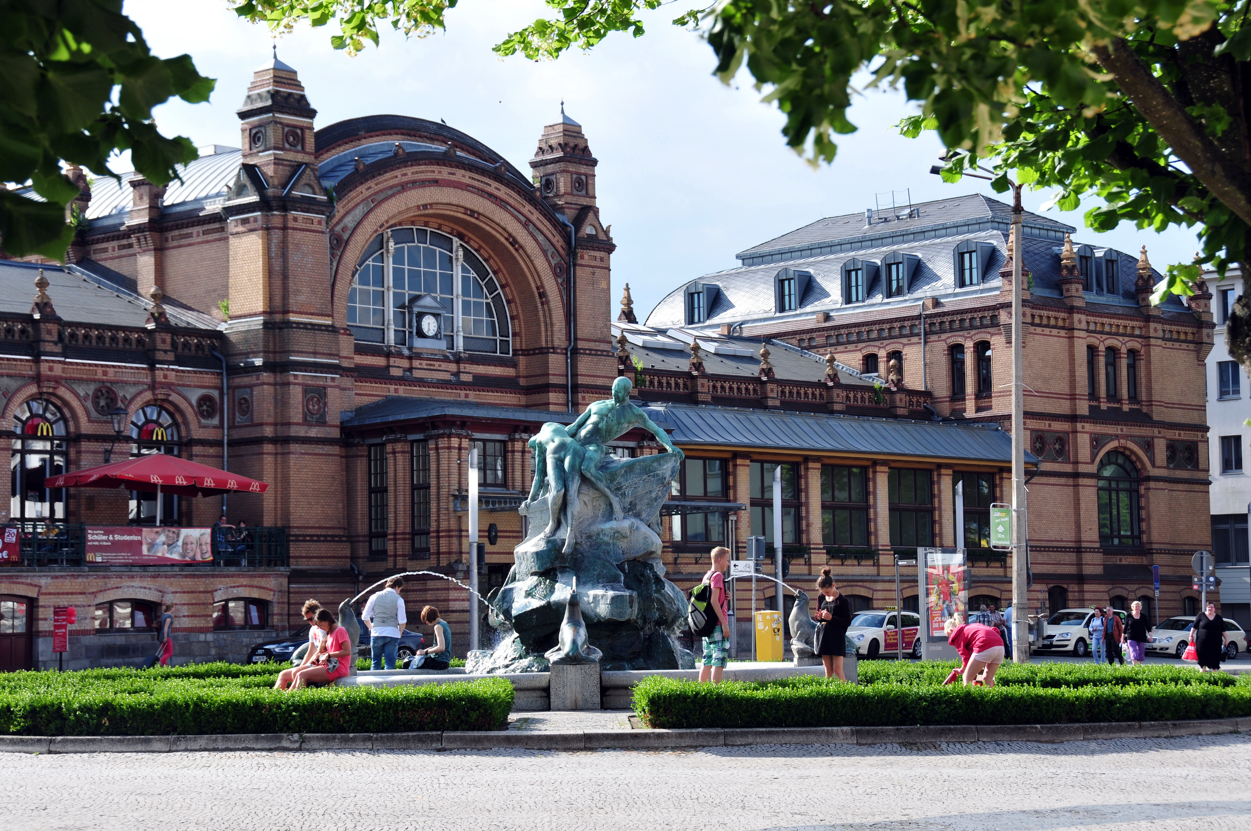 Schwerin; mit 50mm Brennweite von der Orangerie zum Bahnhof Brunnen Rettung aus Seenot und Hauptbahnhof